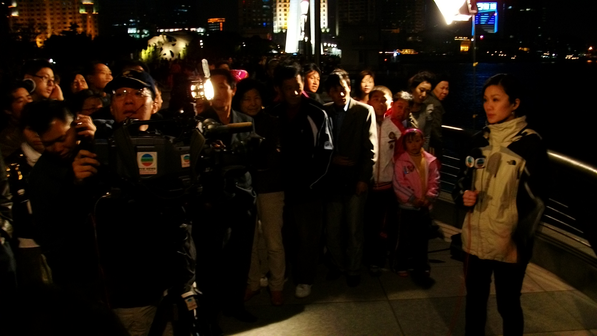 中文（中国大陆）: 香港无线电视记者方健仪在上海外滩录制有关上海世博会的新闻报道，左边打电话者为其夫洪楚恒。